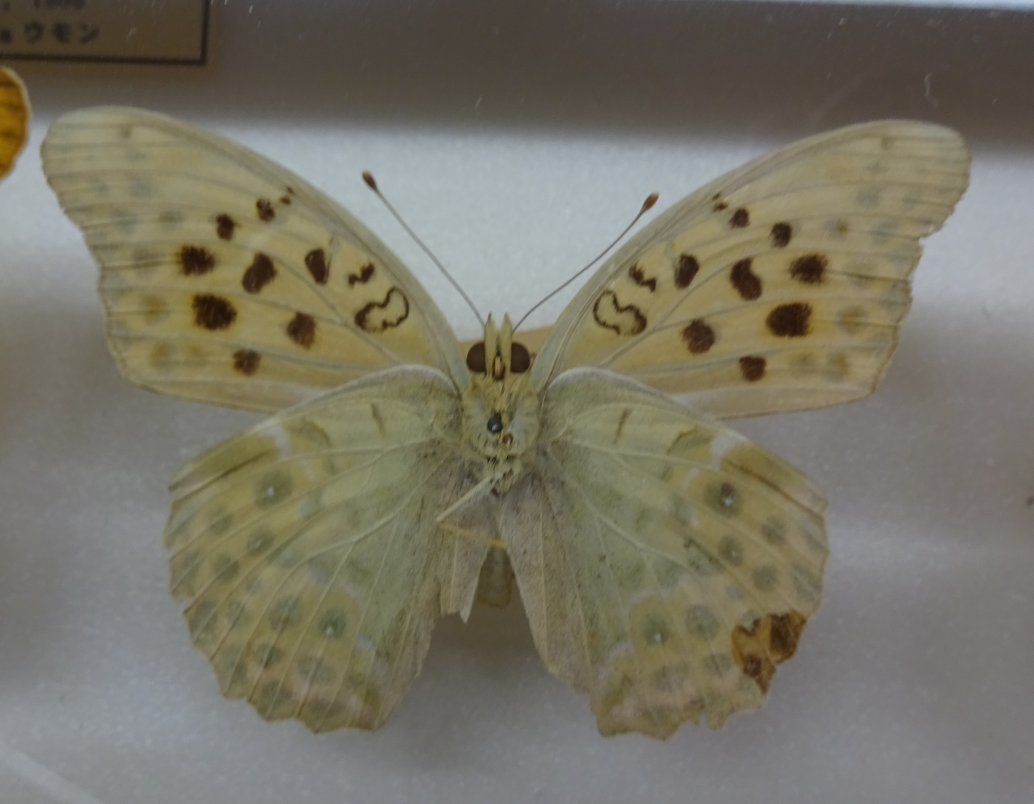 クモガタヒョウモン